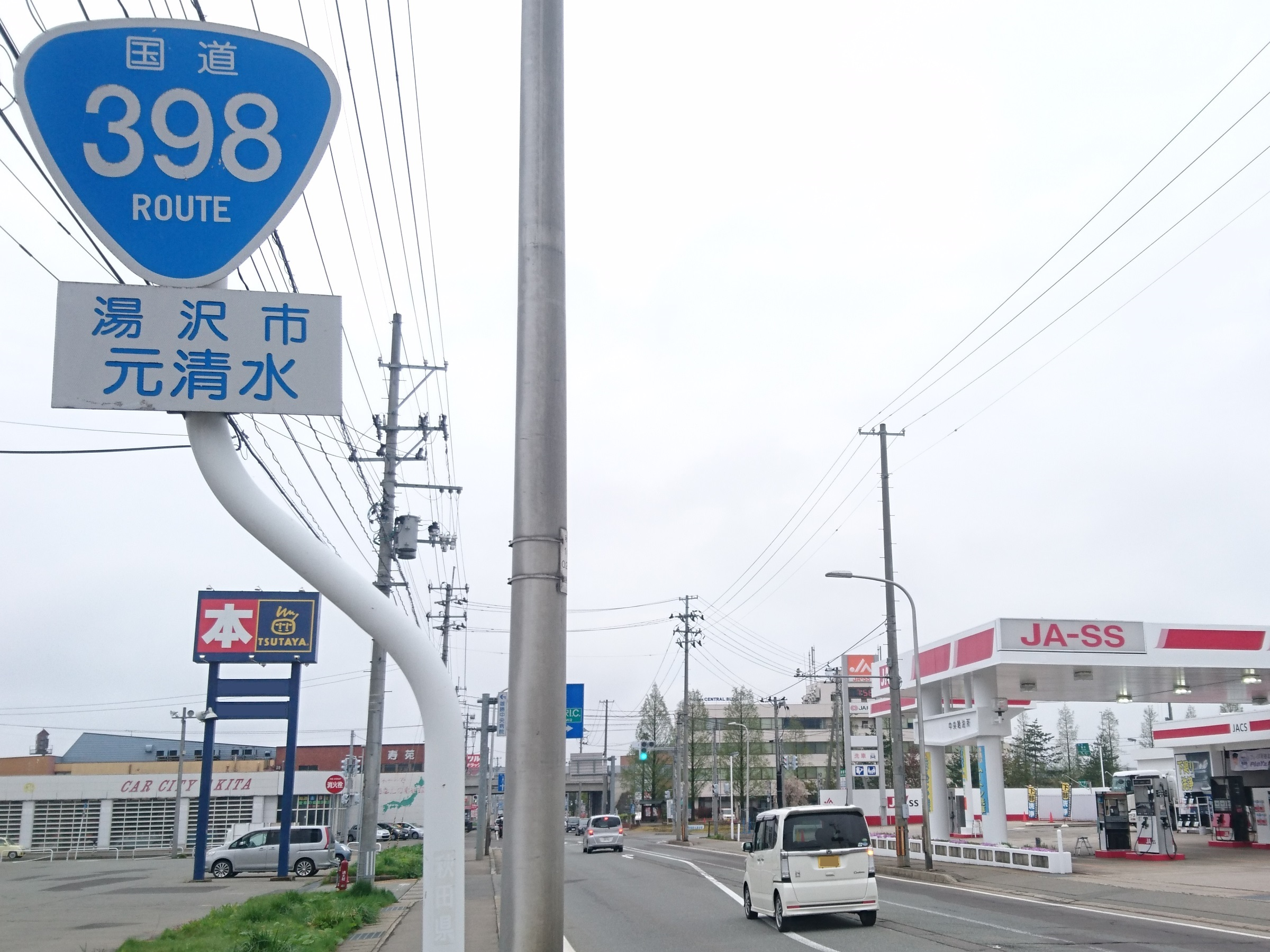 湯沢市元清水付近の国道398号。